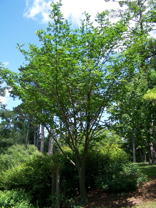 India Quassia Tree, Picrasma quassioides Morton Arboretum acc. 515-63-5